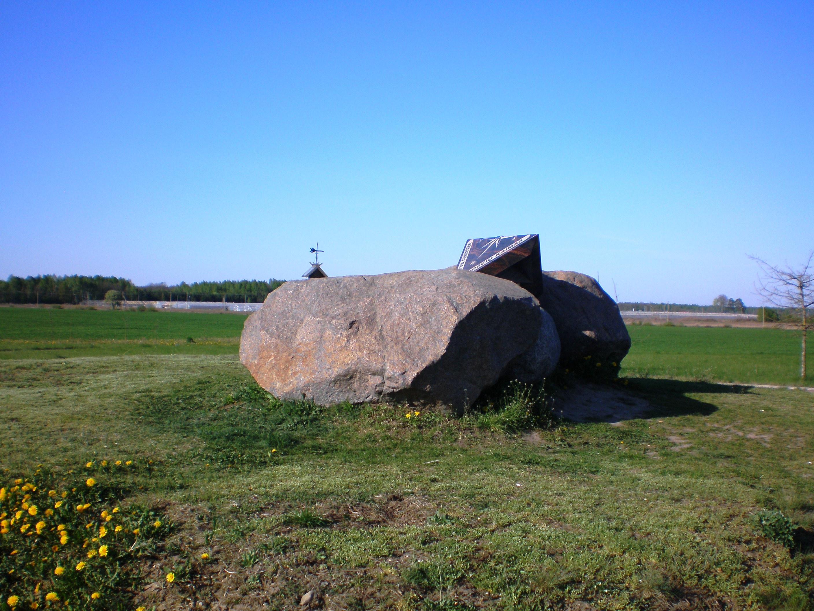 Centro geografico de Lituania en localidad Ruoščiai (mun. Kėdainiai)